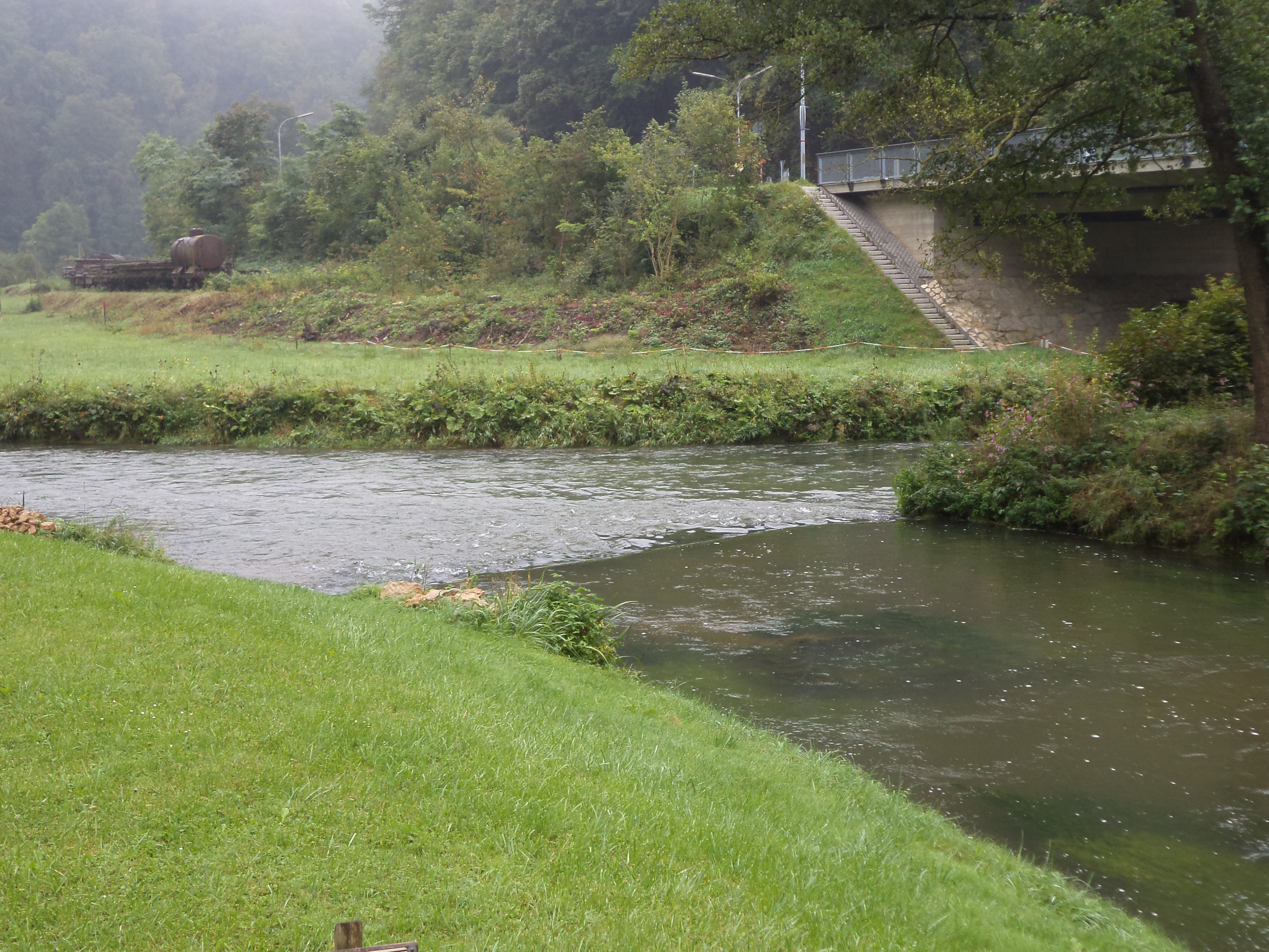 Die Püttlach (vorne rechts) mündet in die Wiesent (v. rechts n. links)